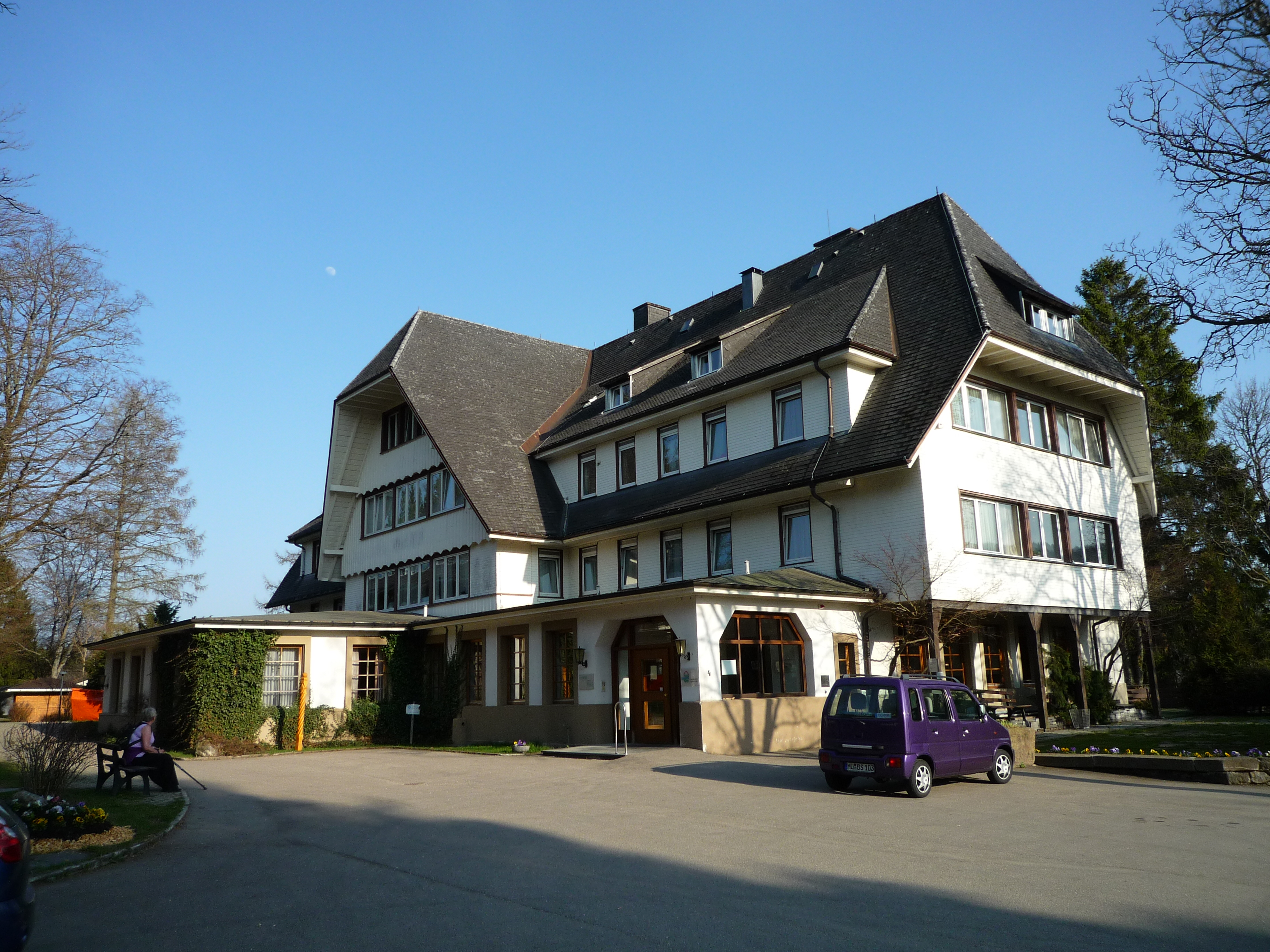 Földi-Klinik Hinterzarten